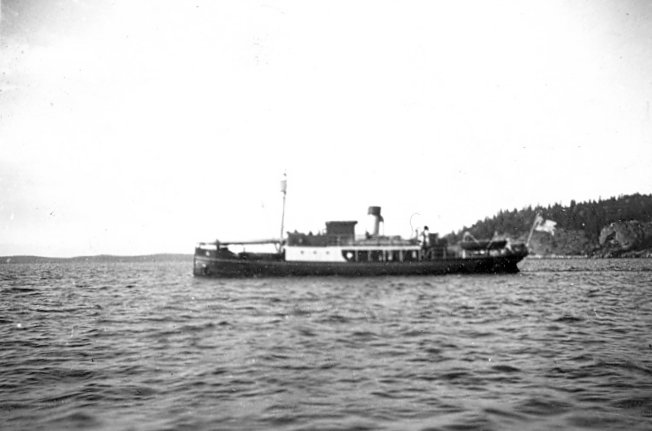 Sjömätaren HMS Svalan utanför Karlskrona 1952